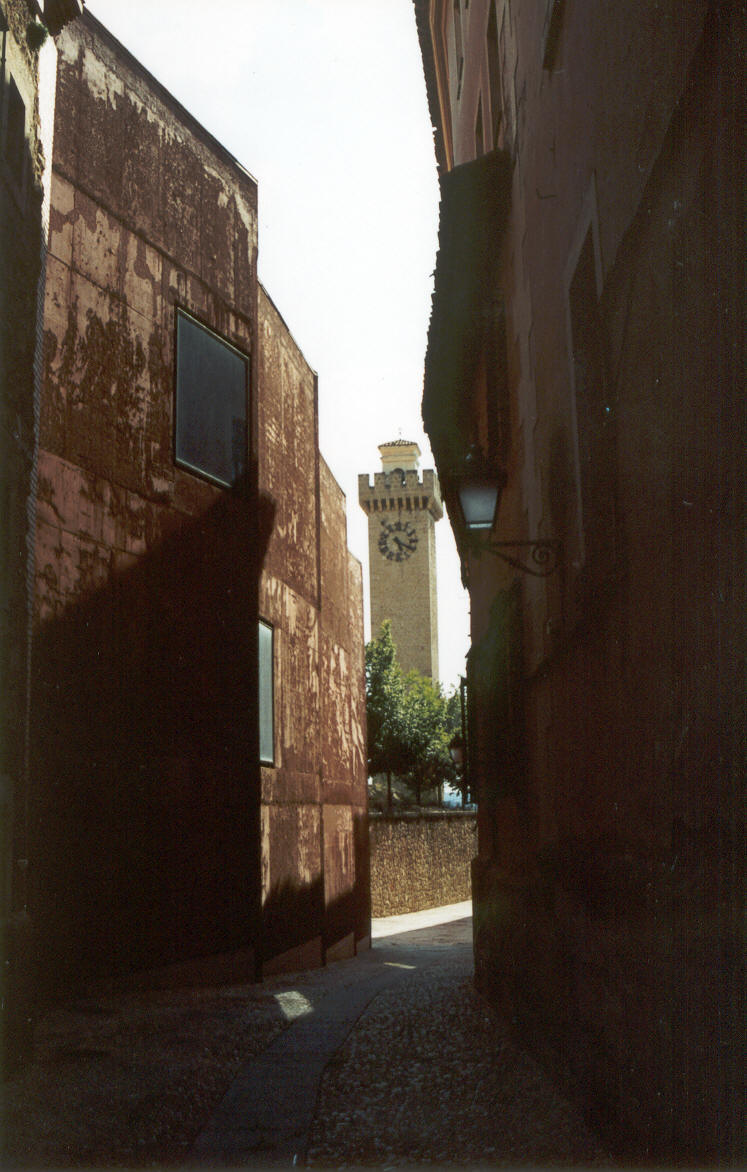 Torre Mangana (Cuenca (España)). Es una torre defensiva que constituye un buen ejemplo de la arquitectura árabe en España. Autor: Fev. Fecha: agosto 2002